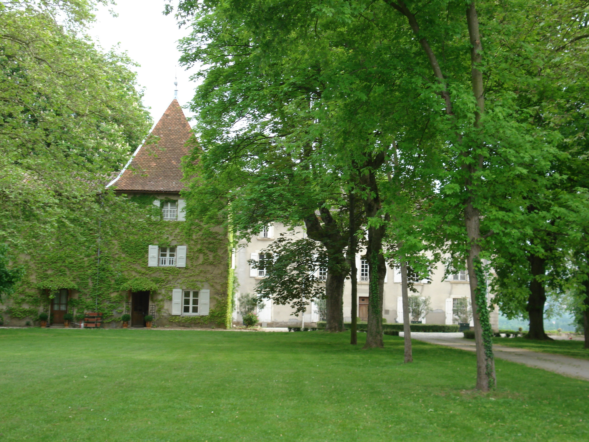 Château de Joyeuse à Lapeyrouse-Mornay dans la Drôme